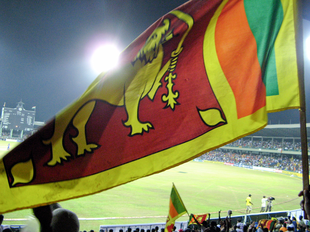 Sri Lanka v India, 3rd ODI, Colombo, Sri Lanka